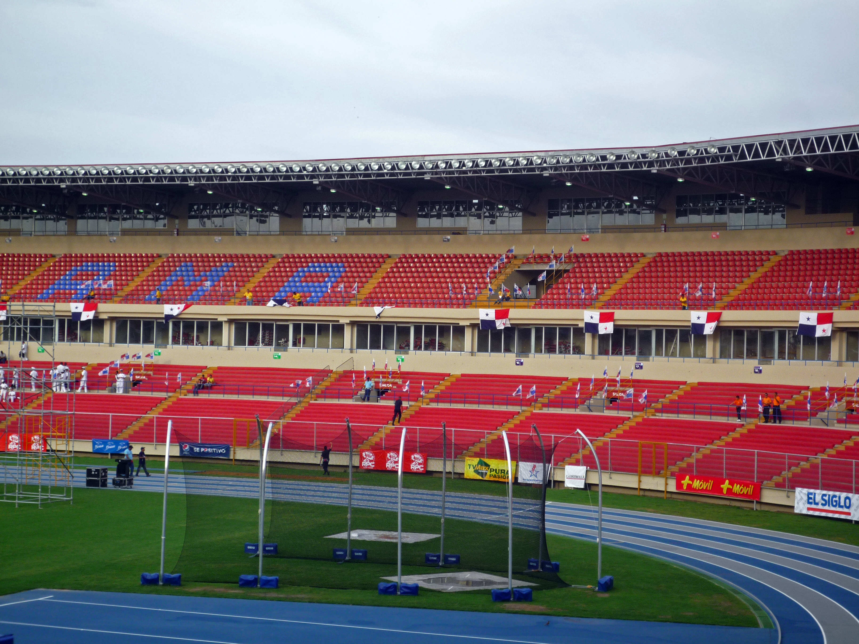 Estadio Rommel Fernández, ciudad de Panamá.